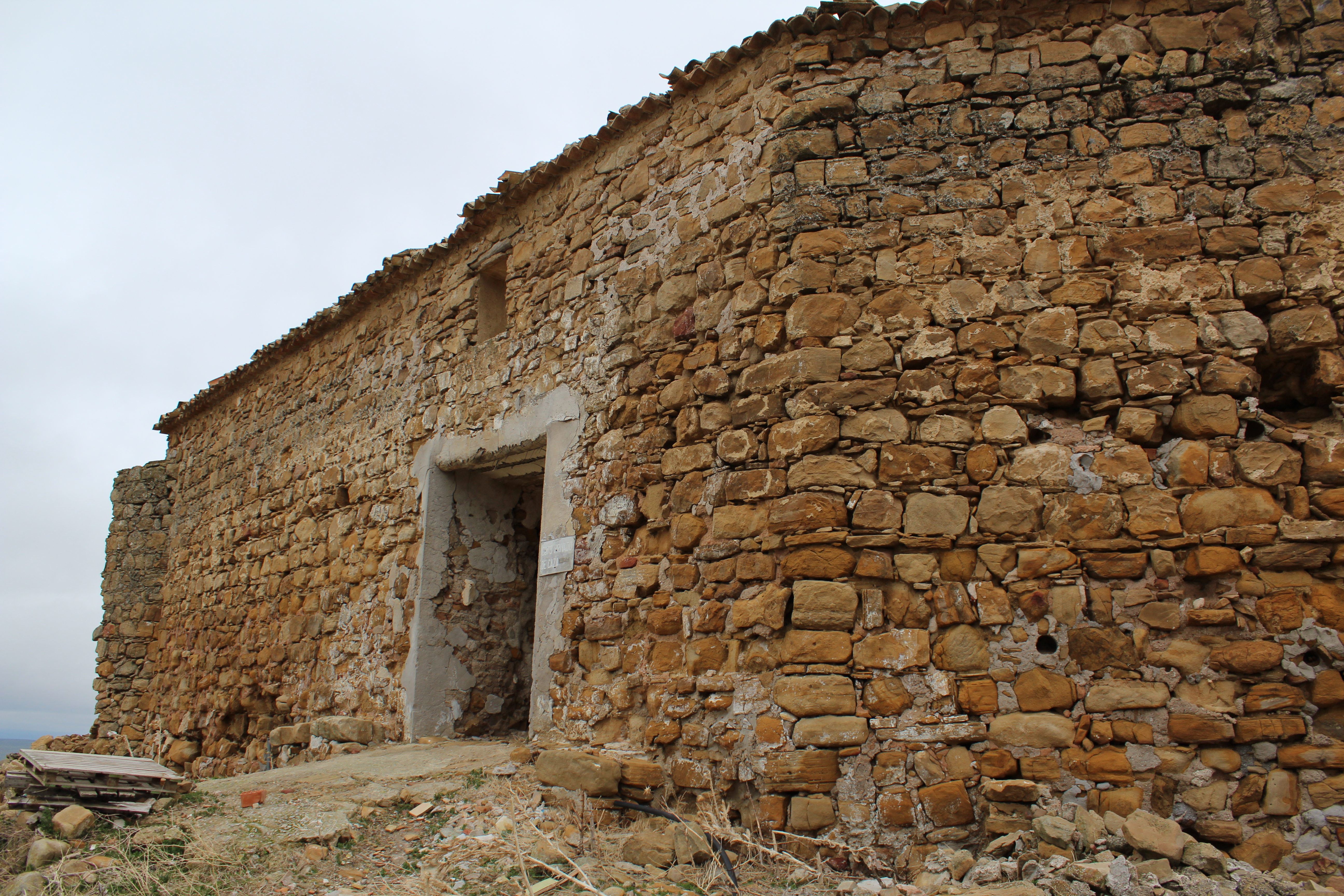 Fachada noroeste, con puerta integrada.